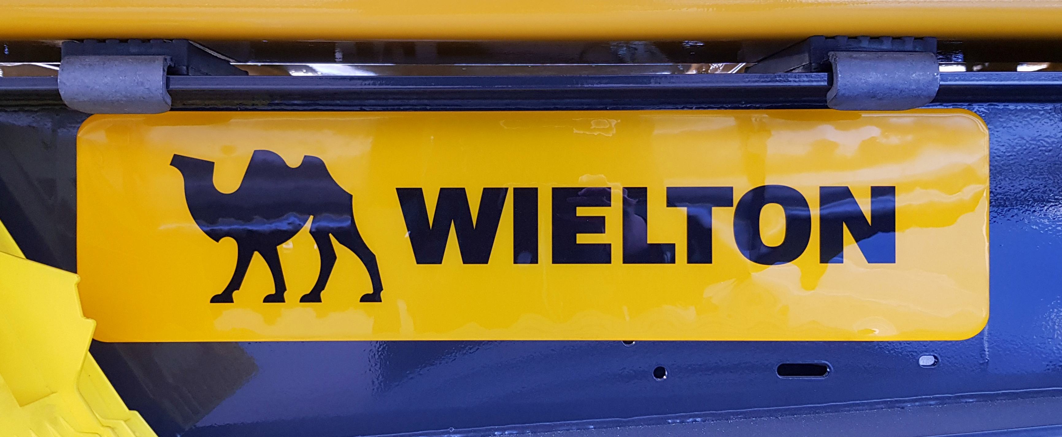 Sticker mit Logo des polnischen Fahrzeugherstellers Wielton am Fahrgestell eines Sattelaufliegers.